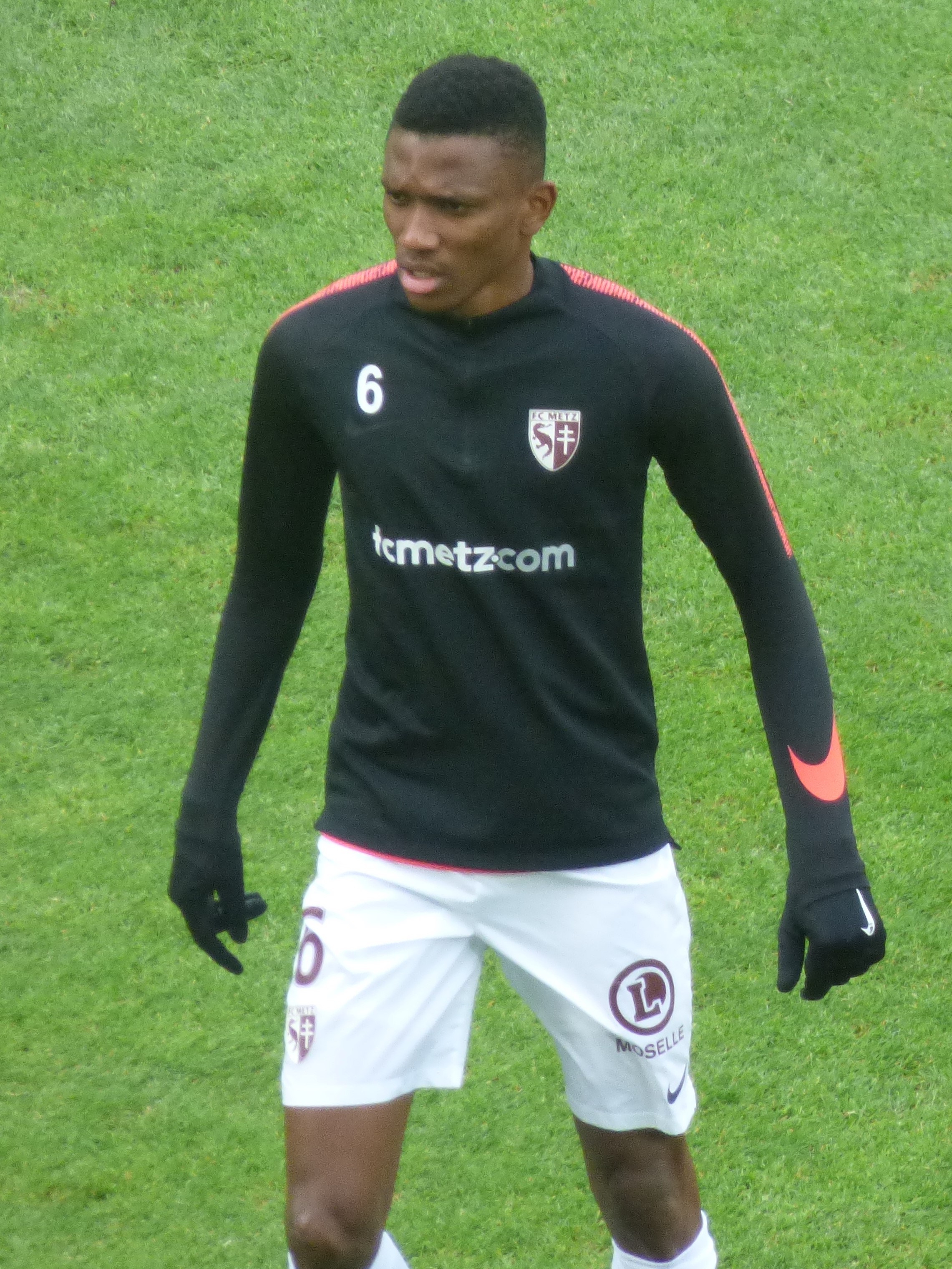 Mamadou Fofana avant le match RC Lens / FC Metz, comptant pour la vingt-quatrième journée du championnat de France de Ligue 2 2018-2019, le 9 février 2019, au Stade Bollaert-Delelis.